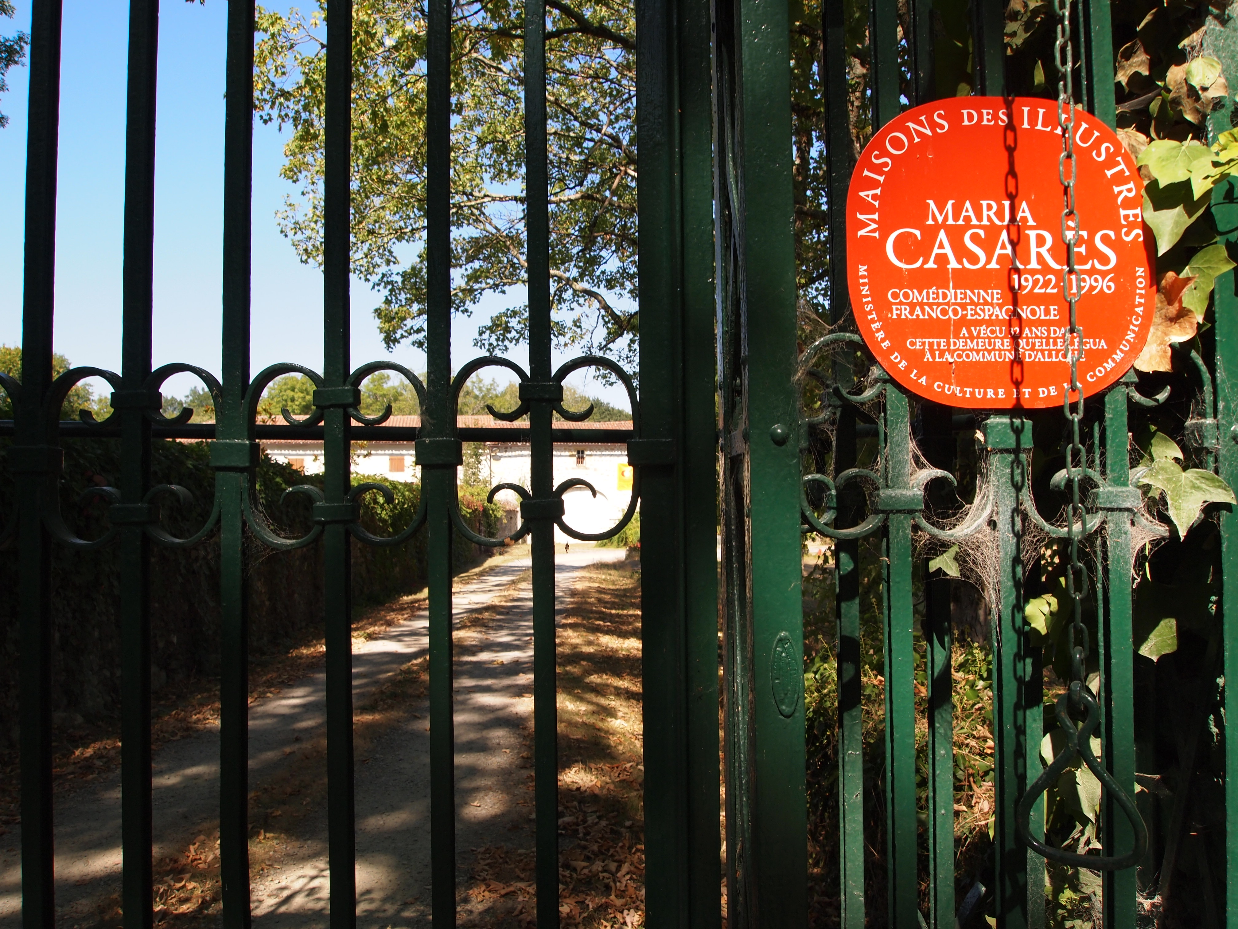 Logis de la Vergne, à Alloue en Charente (inscrit, 2002)